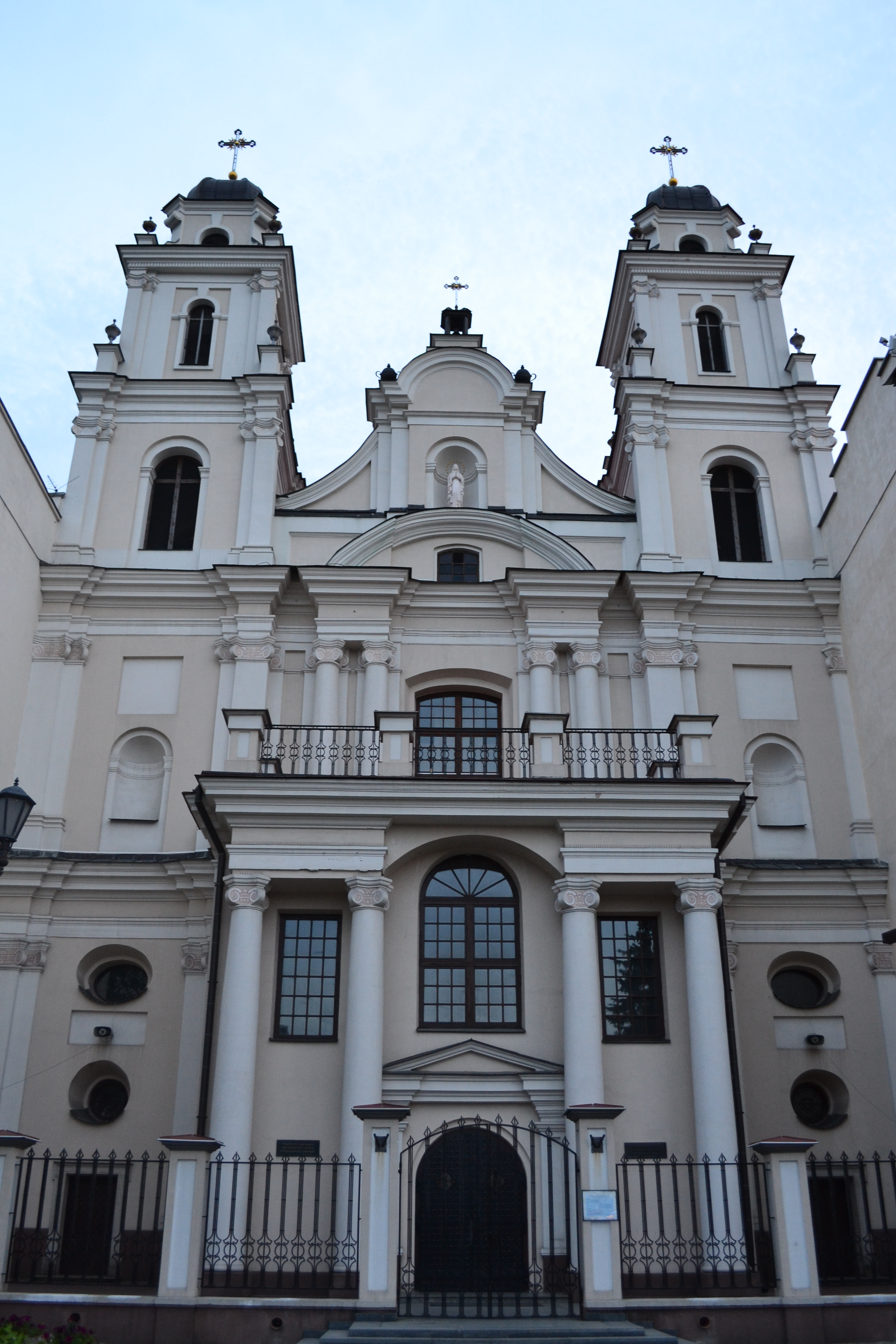 Беларуская (тарашкевіца): Архікатэдральны касьцёл Імя Найсьвяцейшай Панны Марыі (Менск) This is a photo of Belarusian heritage monument. Reference number: 712Г000235 ( WLM)